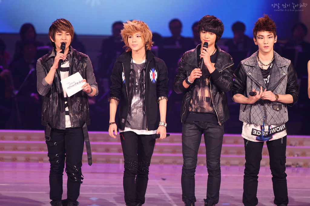 110303 KBS 창립 특집 음악회 SHINee